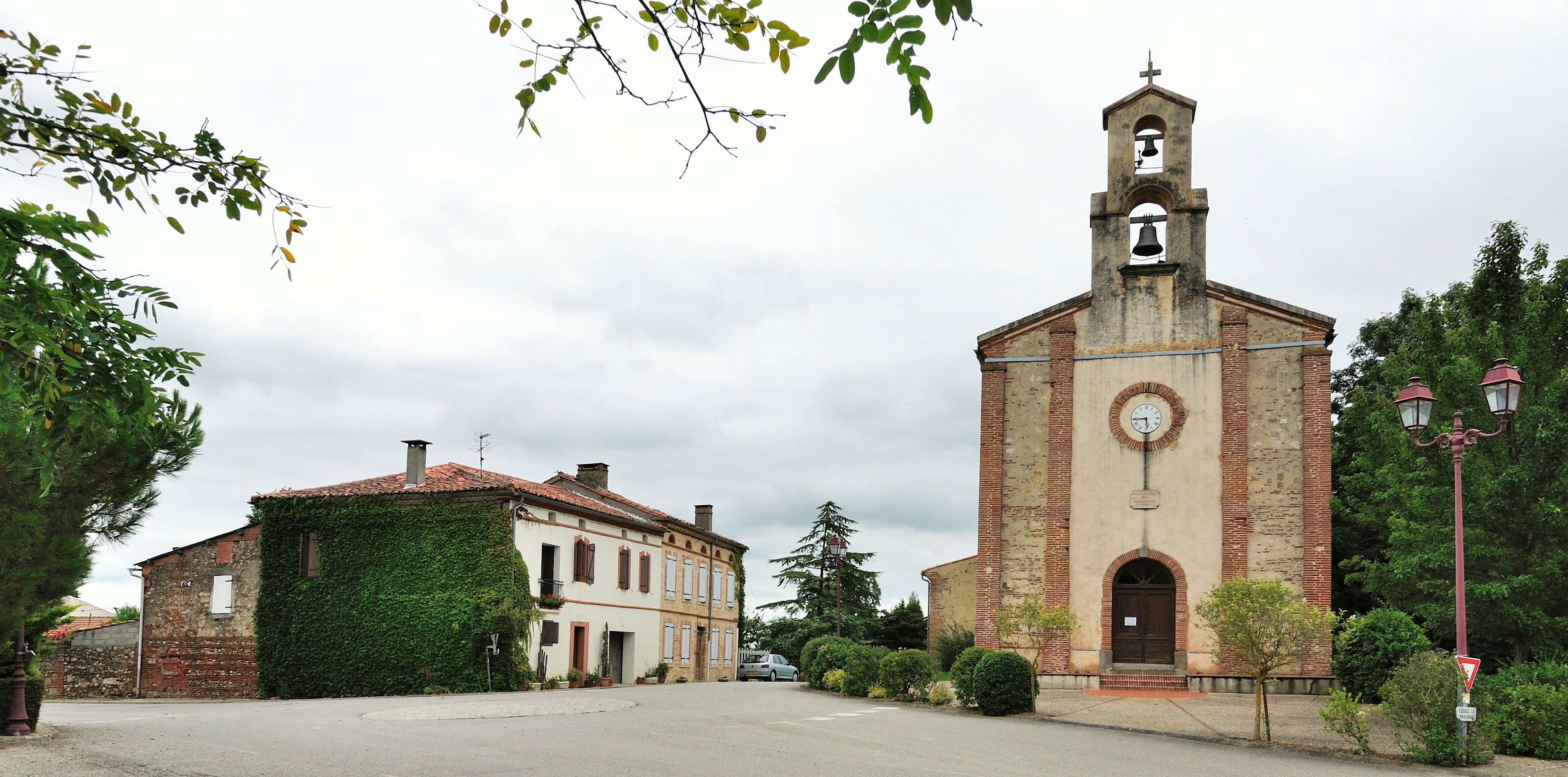 Village de Saint-Michel en Ariège (09)